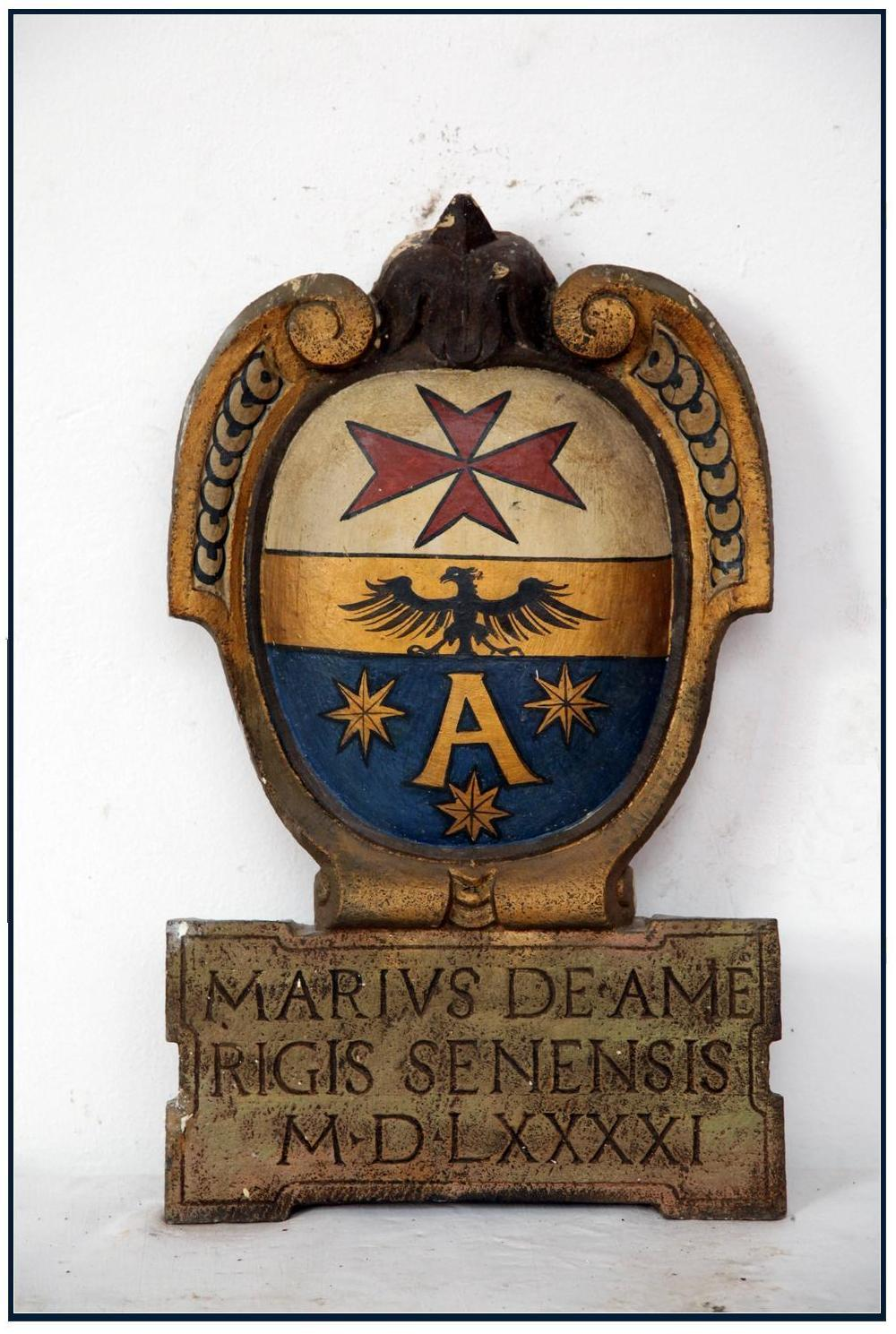 Stemma di Mario Amerighi. Cavaliere di Santo Stefano - D'azzurro, alla lettera A maiuscola d'oro, accompagnata da tre stelle di otto punte dello stesso, disposte 2.1; col capo dell'Impero; il tutto abbassato sotto il capo di Santo Stefano